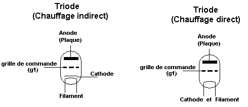 triode à chauffage indirect. Dessin personnel. Catégorie:Tube électronique